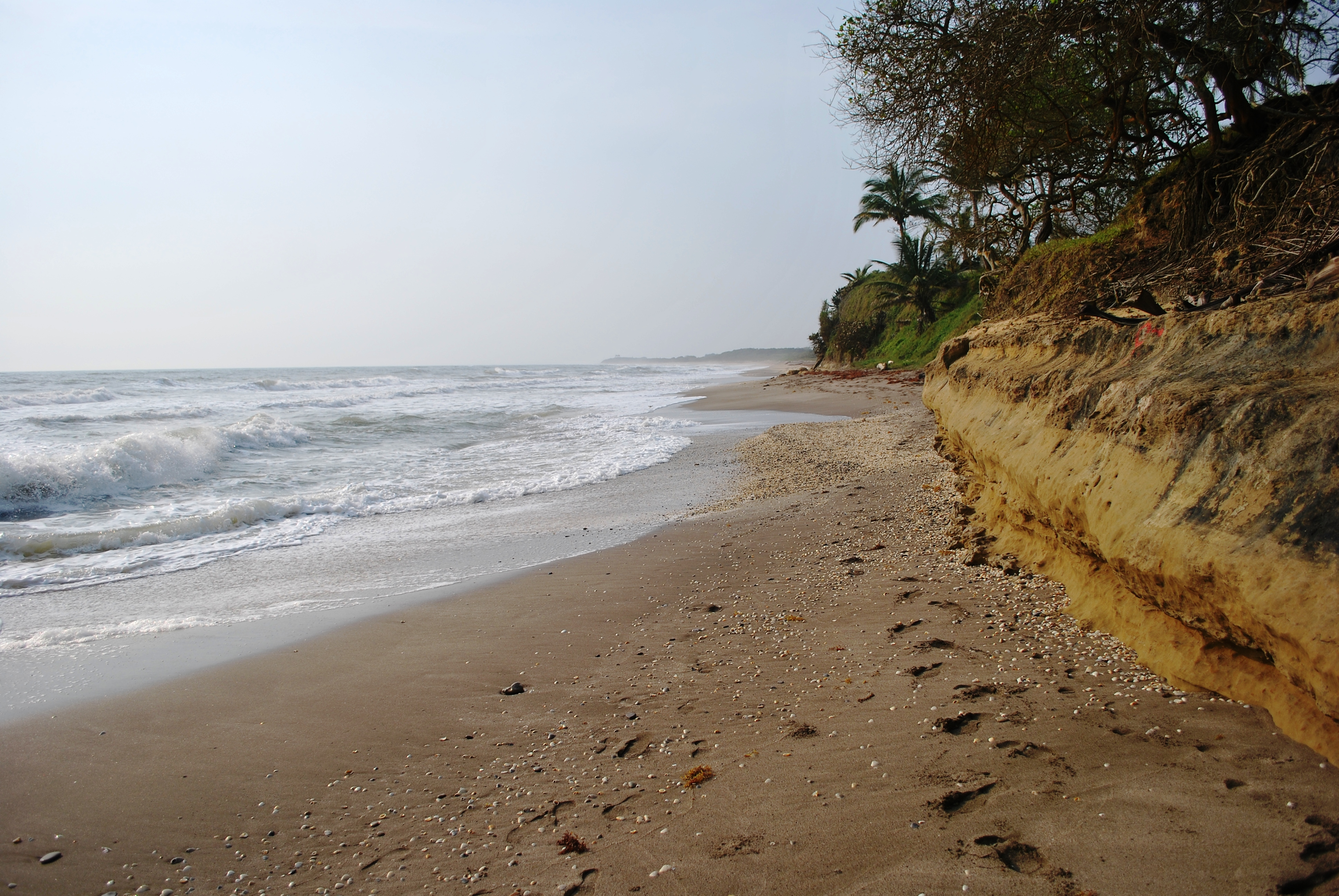 View of north end of Playa Chaparrales, Cazones, Veracruz